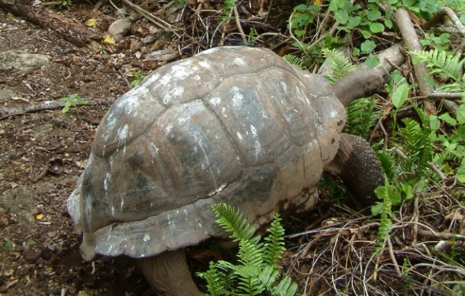 Aldabra-Riesenschildkröte (Dipsochelys dussumieri) [1]